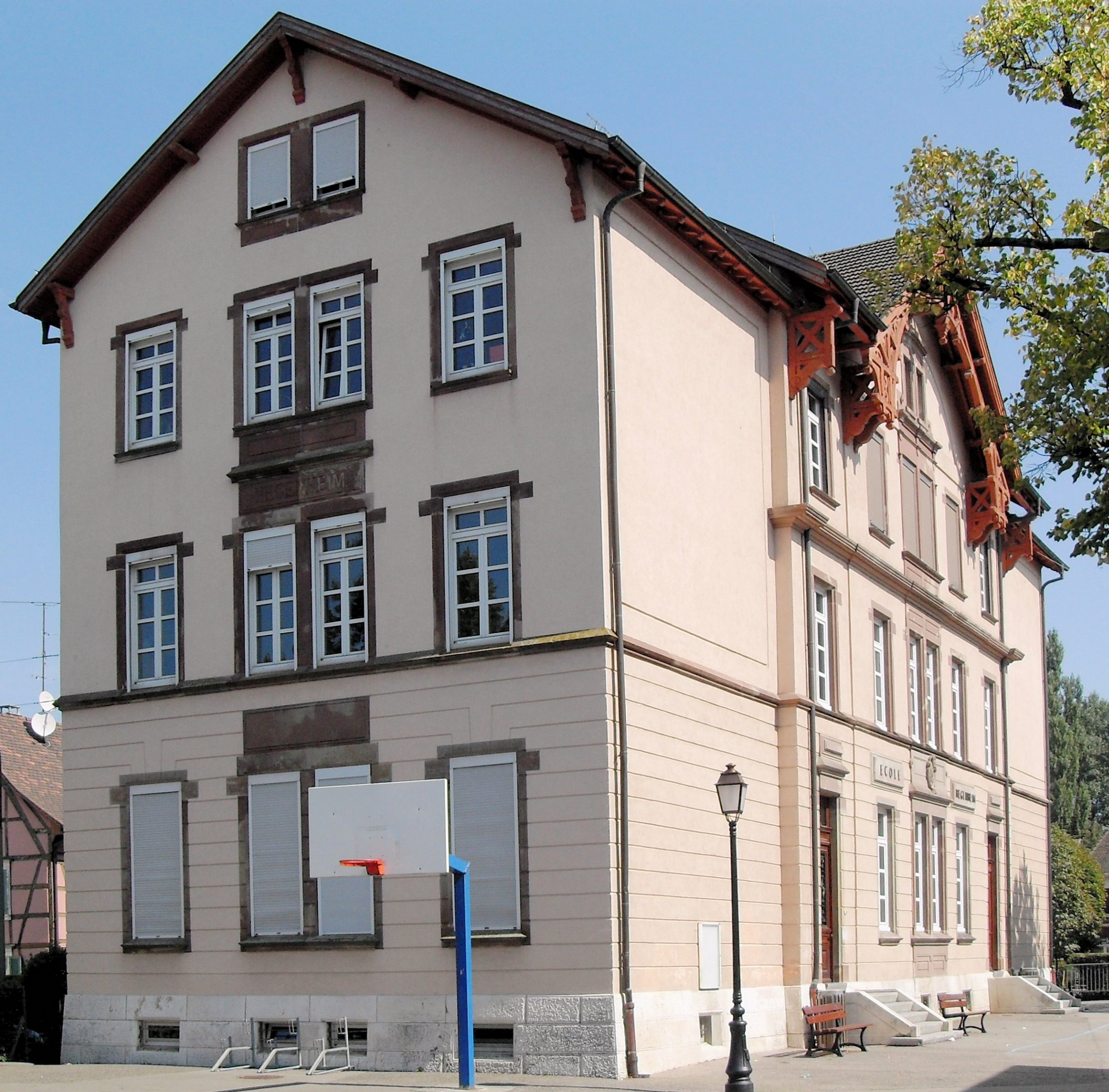 L'école maternelle du village de Hégenheim